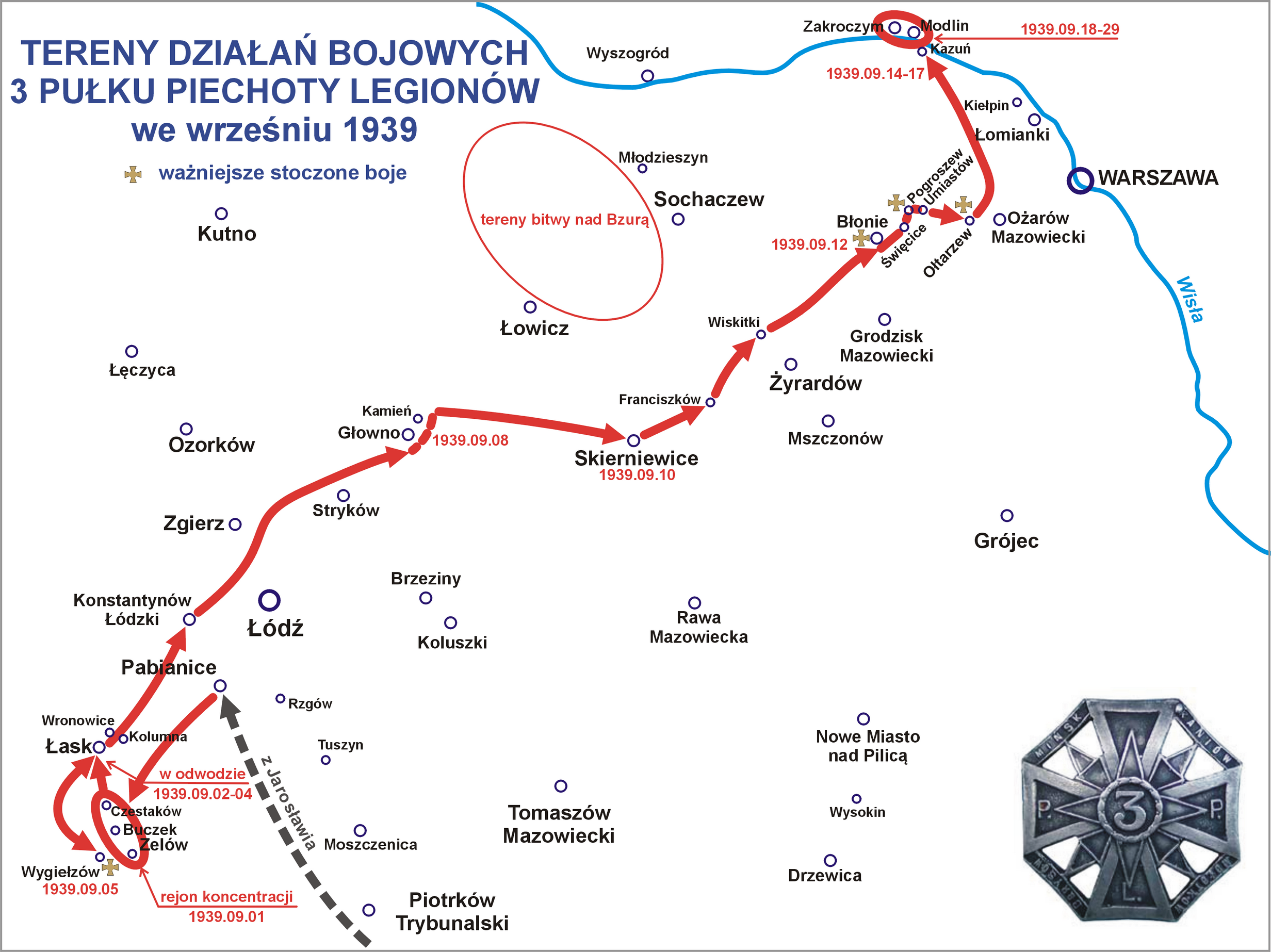 Tereny działań bojowych 3 Pułku Piechoty Legionów we wrześniu 1939